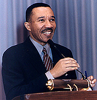 NAACP President Kweisi Mfume